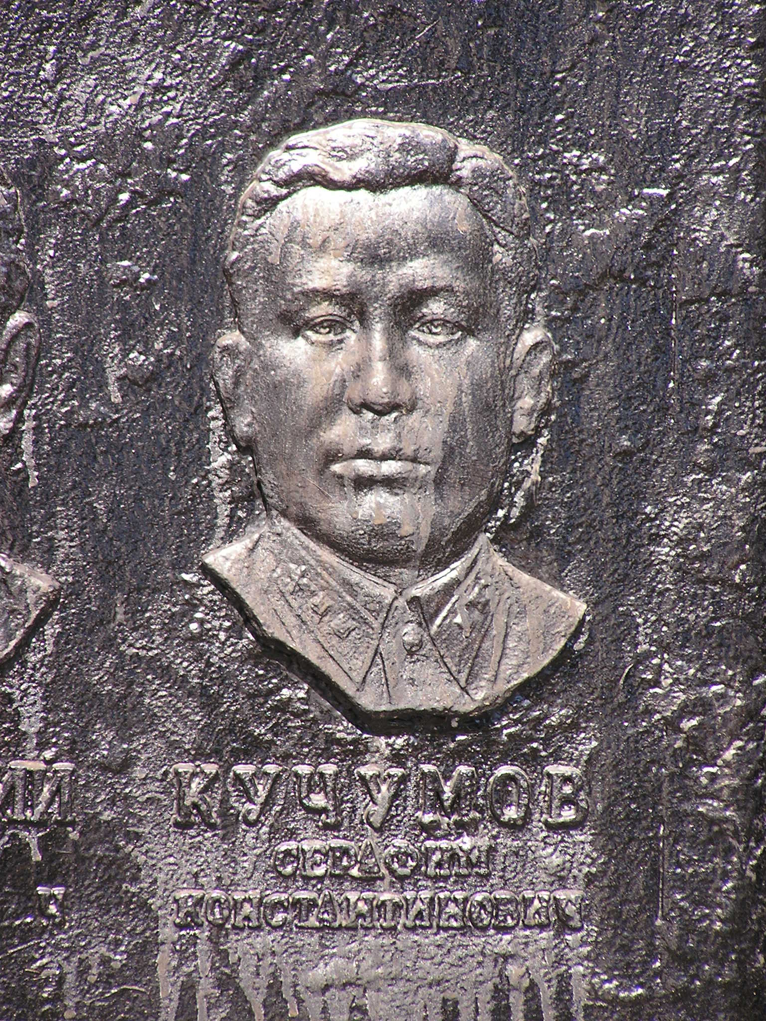 Донецк. Кучумов